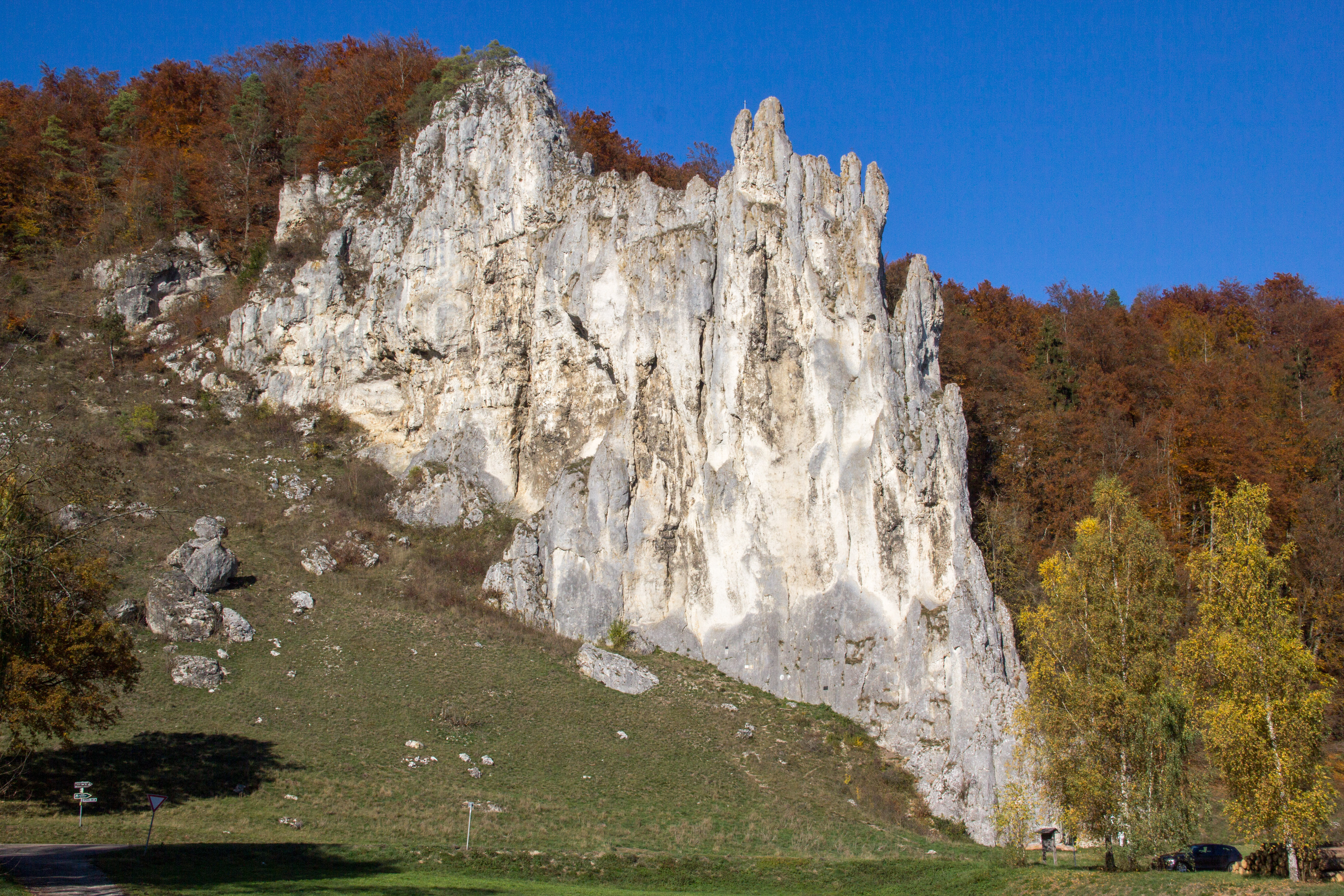 Wellheim, Dohlenstein, Geotop